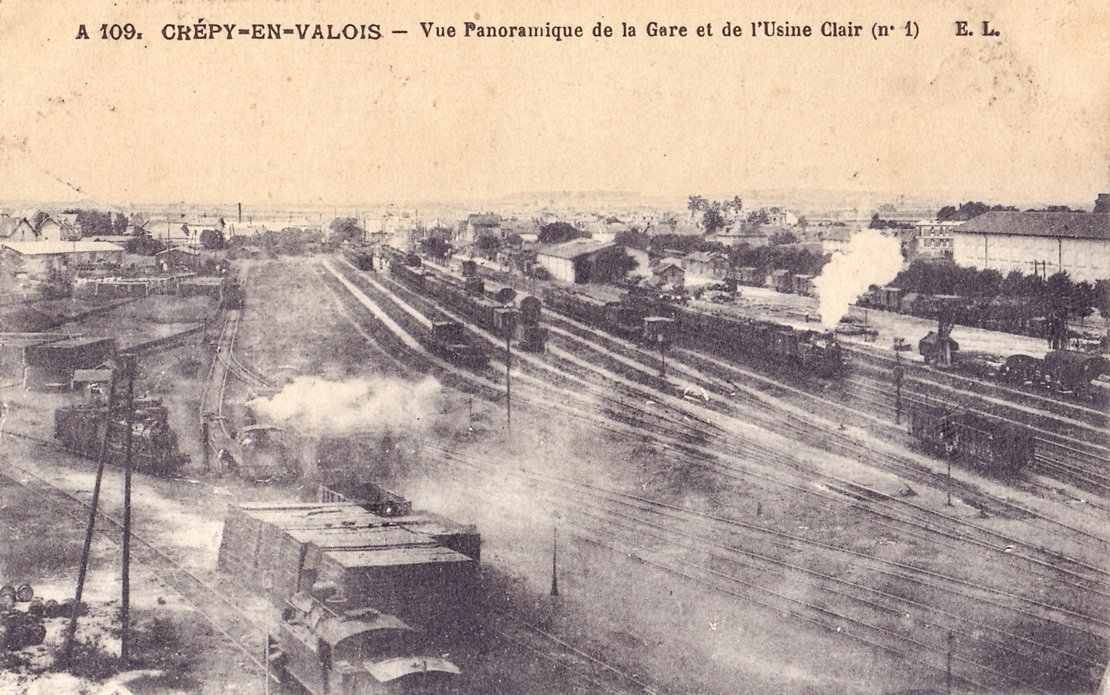 Carte postale ancienne éditée par EL, n°A109 : CREPY-EN-VALOIS - Vue panoramique de la Gare et de l'Usine Clair (n°1)